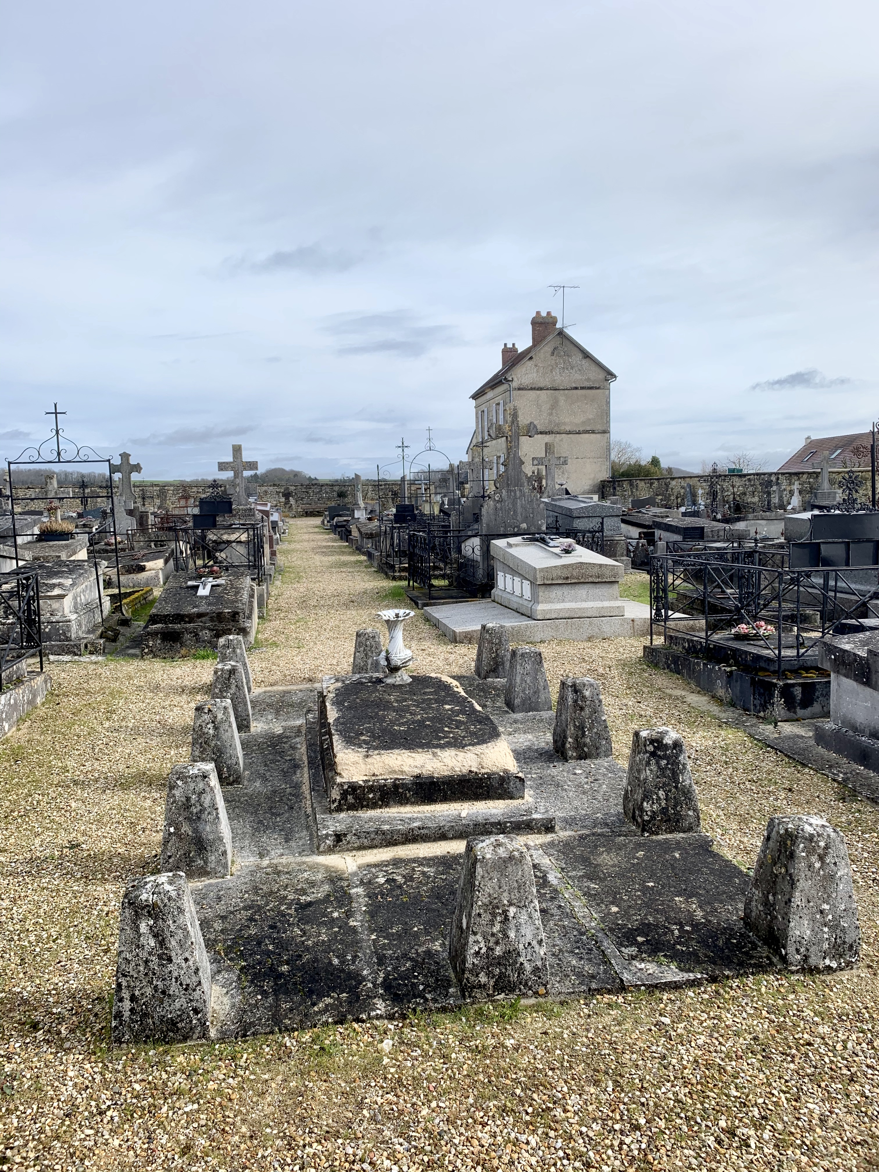 Tombe d'Alfred Potiquet (1820-1883), cimetière de Magny-en-Vexin